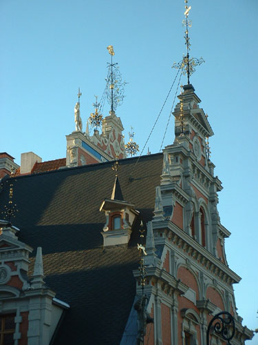 Schwarzhäupterhaus in Riga (Lettland)